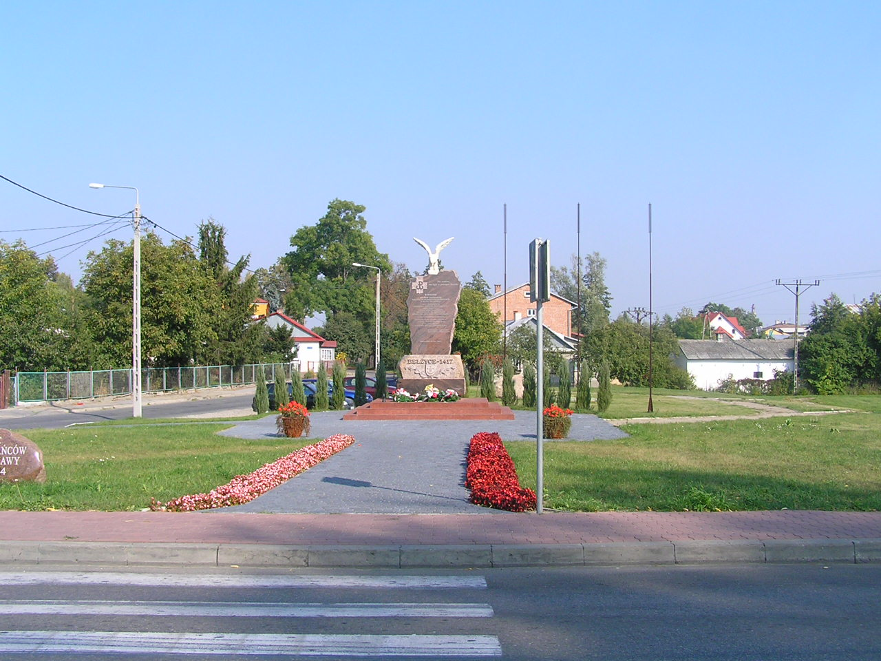 jeszcze noga